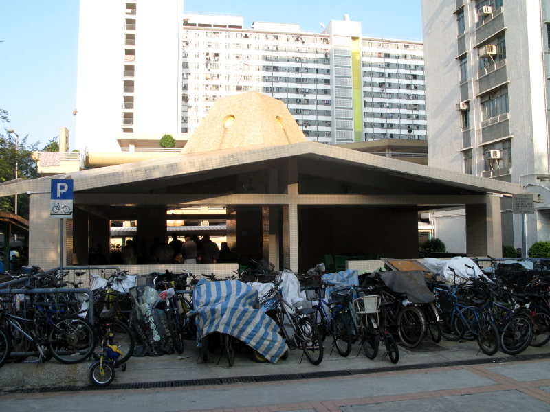 HK Chun Shek Estate Dai Pai Dong